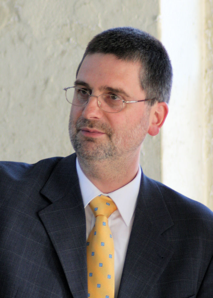 Dr. Ruediger Storch, Bürgermeister von Eitorf